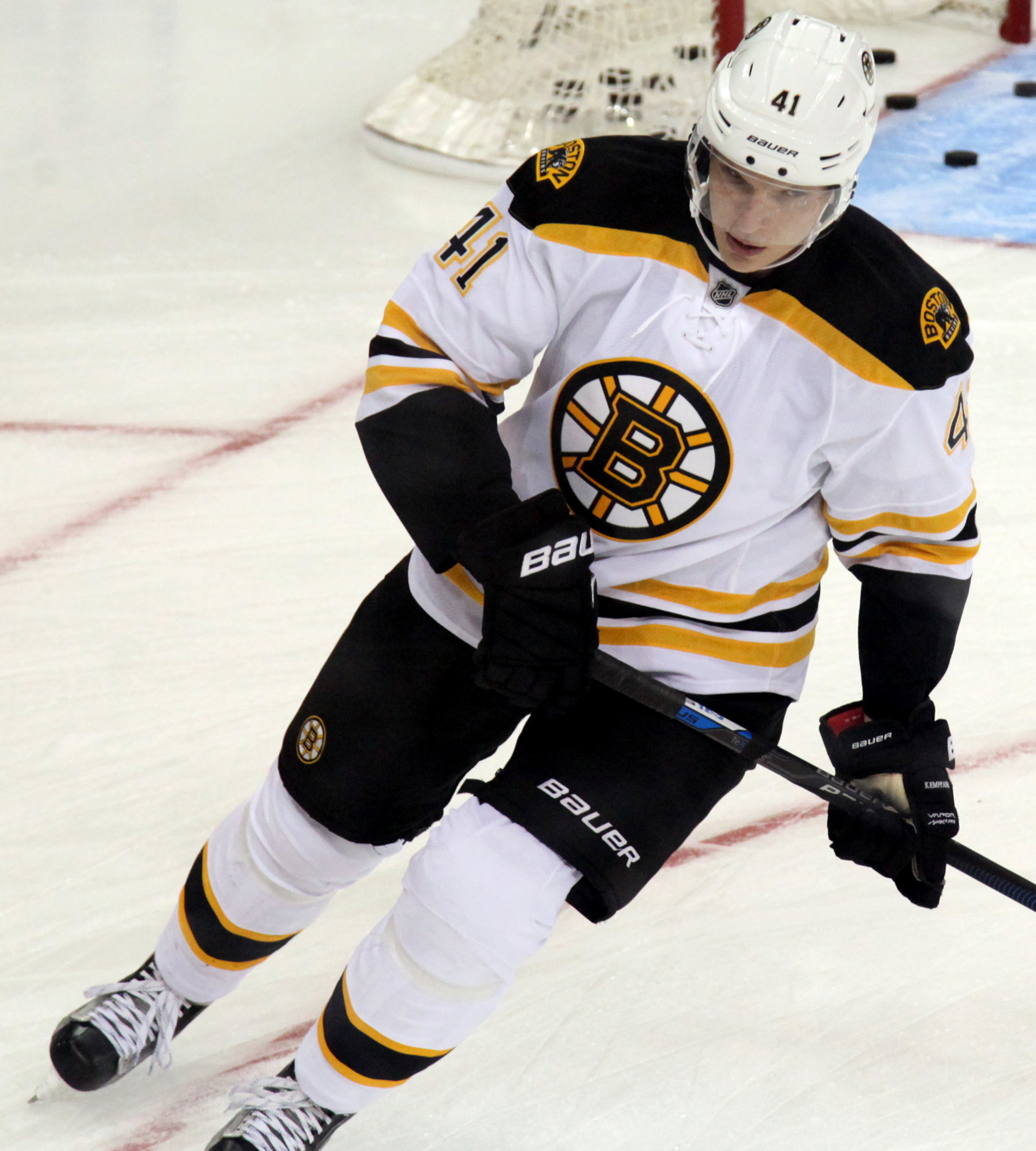 Kemppainen in September 2015.